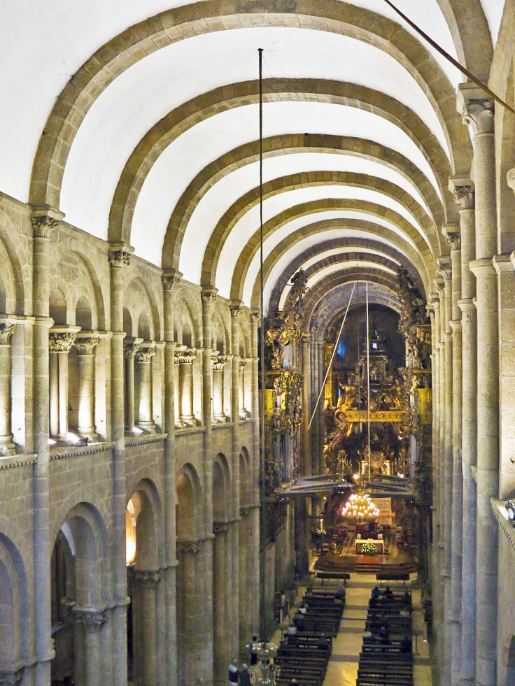 Catedral de Santiago de Compostela desde a Tribuna